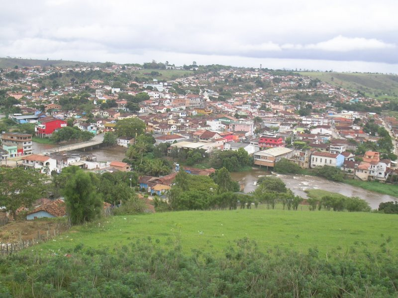 Foto Ampla de Medeiros Neto.